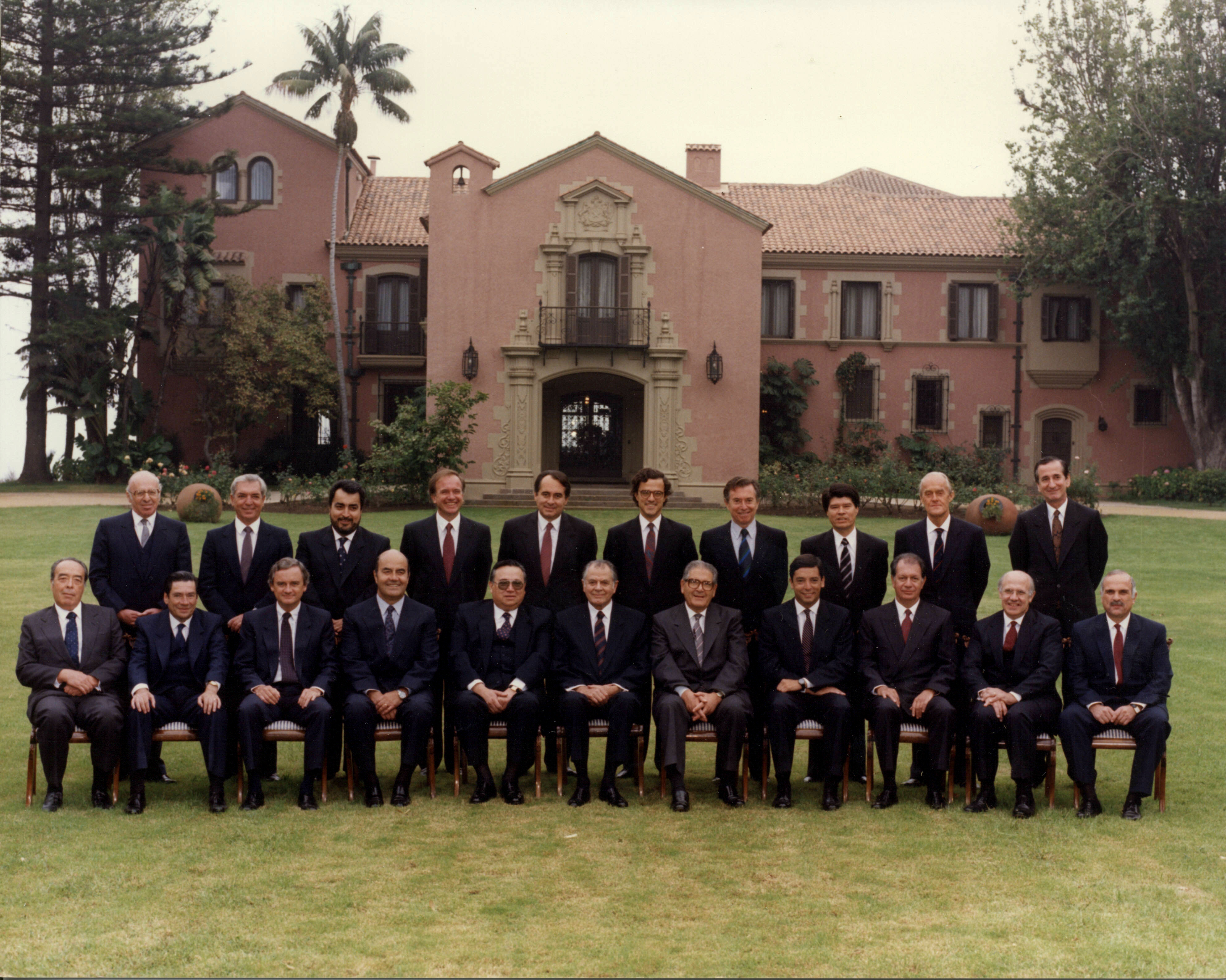 Fotografía del presidente Patricio Aylwin con su gabinete, entre otros: (sentados de izq. a der.) Juan Agustín Figueroa, ? , Alejandro Foxley, Patricio Rojas Saavedra, Enrique Krauss, Patricio Aylwin, Enrique Silva Cimma, Carlos Ominami, Ricardo Lagos, ?, ?. De pie (izq. a der.) ?, Sergio Molina Silva, Enrique Correa Ríos, ?, ?, René Cortázar Sanz, Juan Hamilton, Germán Correa Díaz, Edgardo Boeninger, Jaime Tohá González